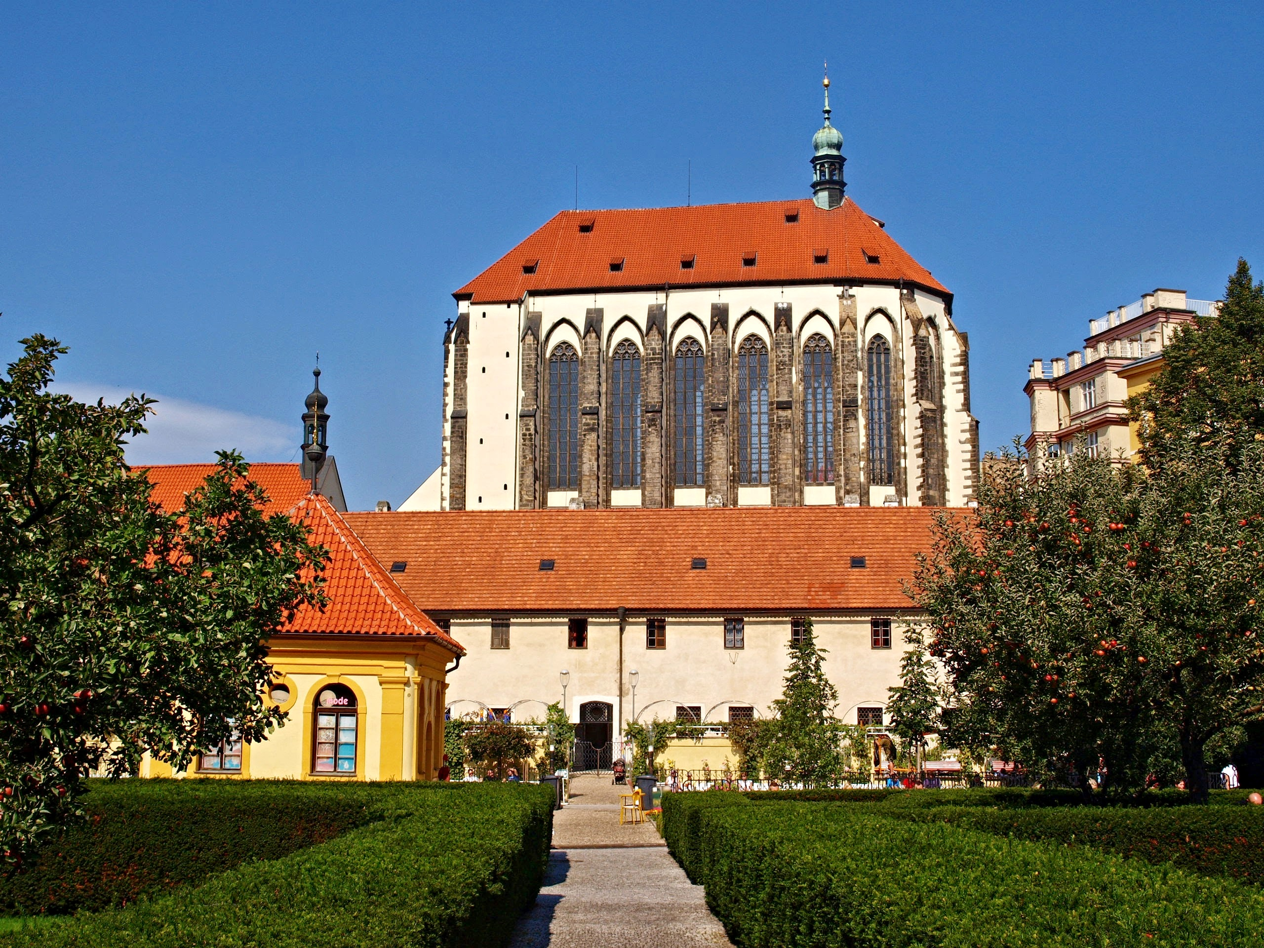 Kostel Panny Marie Sněžné, Praha